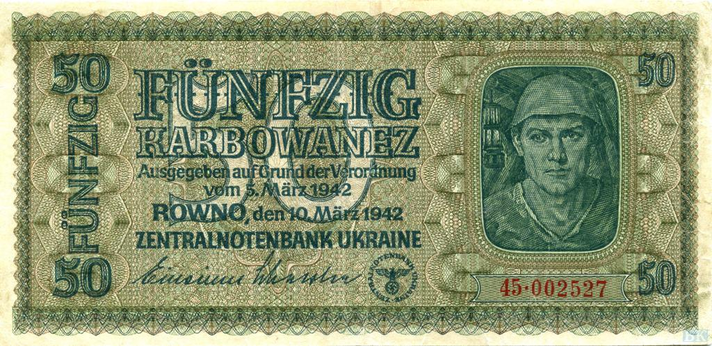 50 карбованцев Рейхскомиссариата Украина, Ровно, март 1942. аверс.